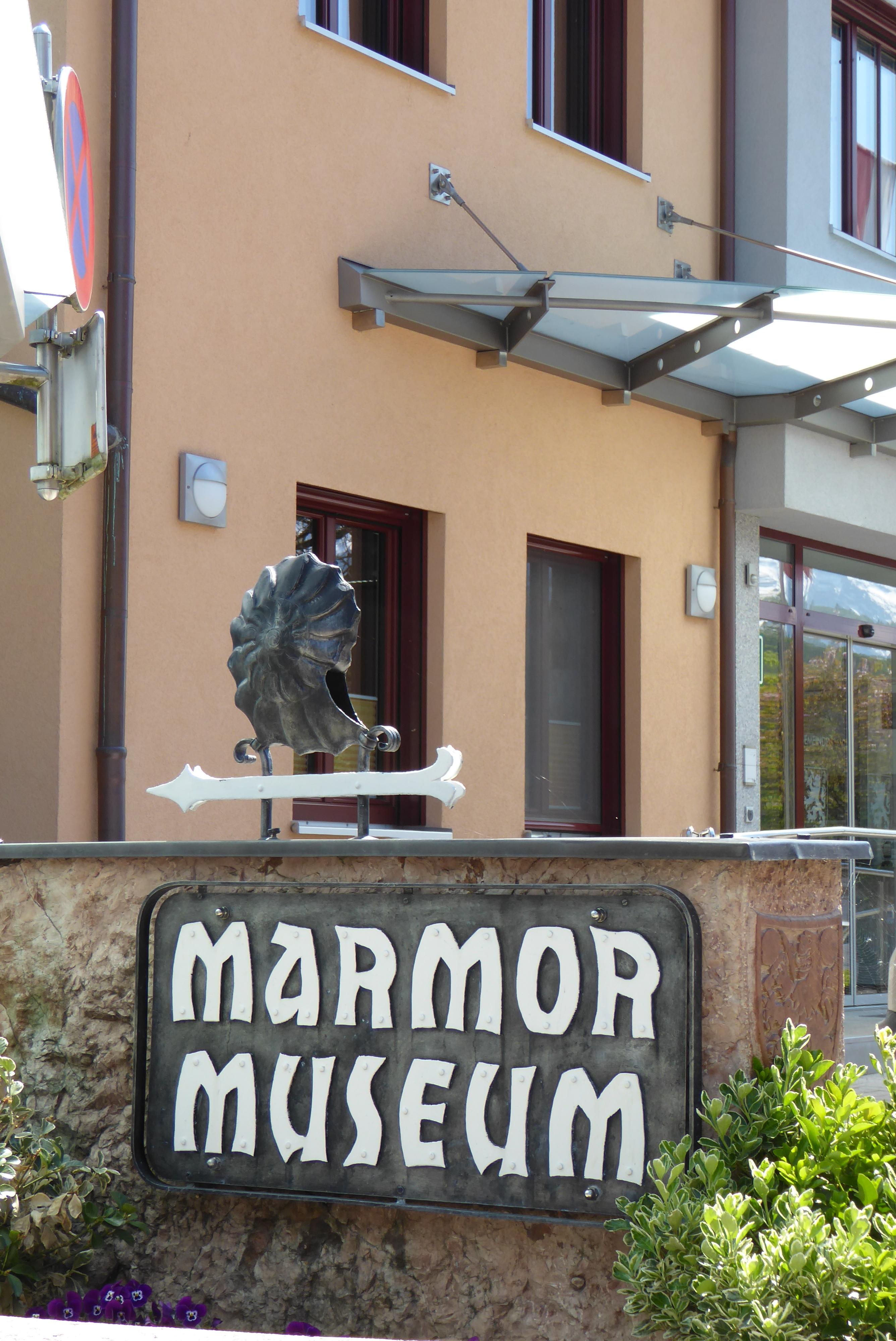 Das Marmormuseum Adnet zeigt Entstehung, Abbau und Verwendung dieses prachtvollen Natursteins.